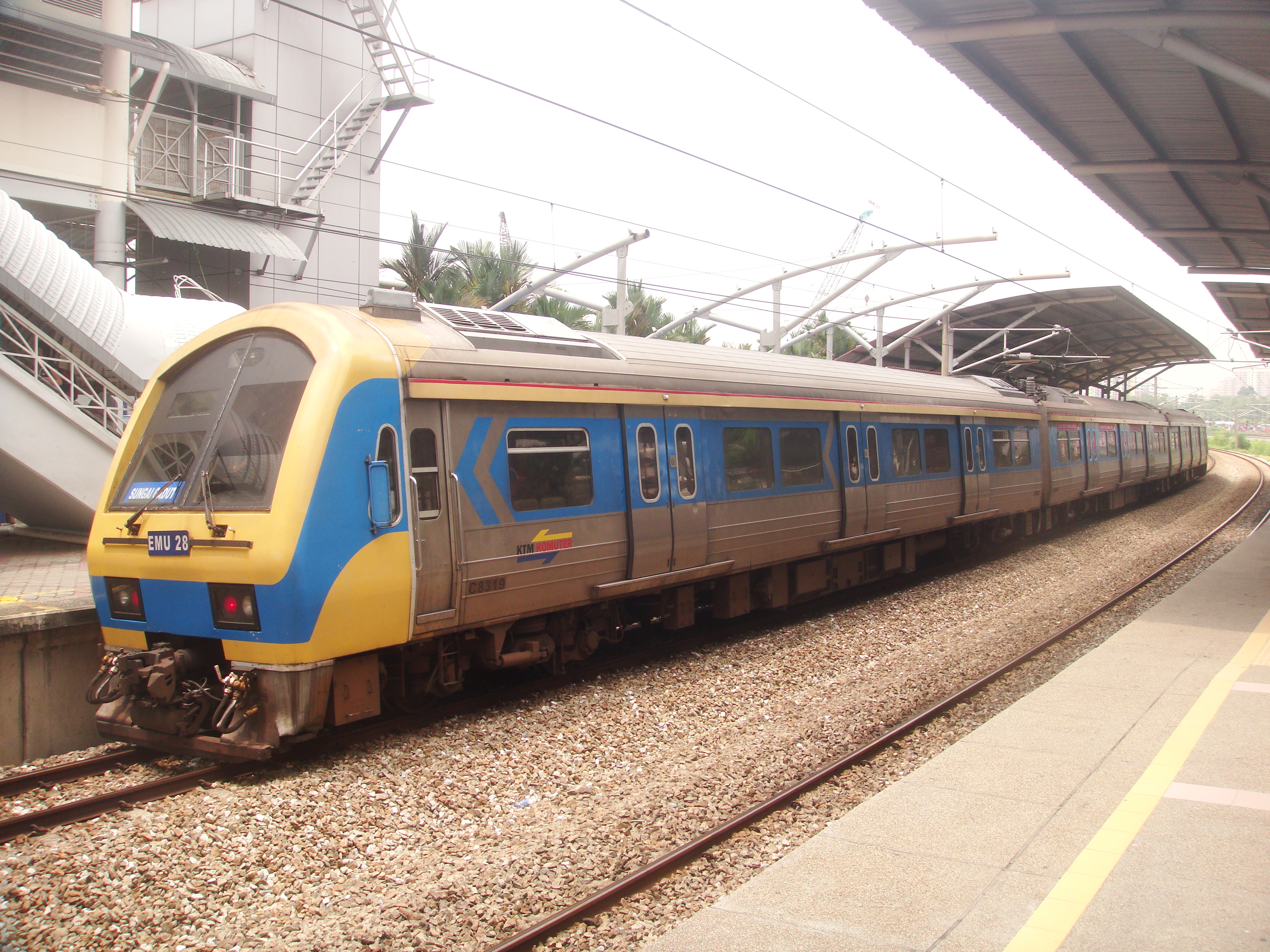 KTM Komuter Class 83 EMU 28 at Bandar Tasik Selatan in Kuala Lumpur, Malaysia.